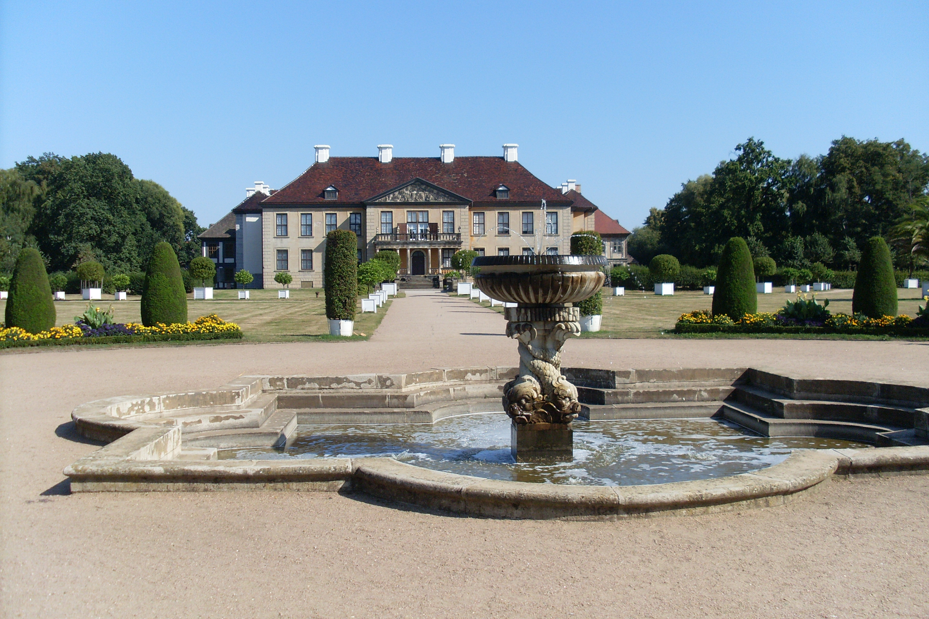 Schloss Oranienbaum, Ansicht von der Parkseite.